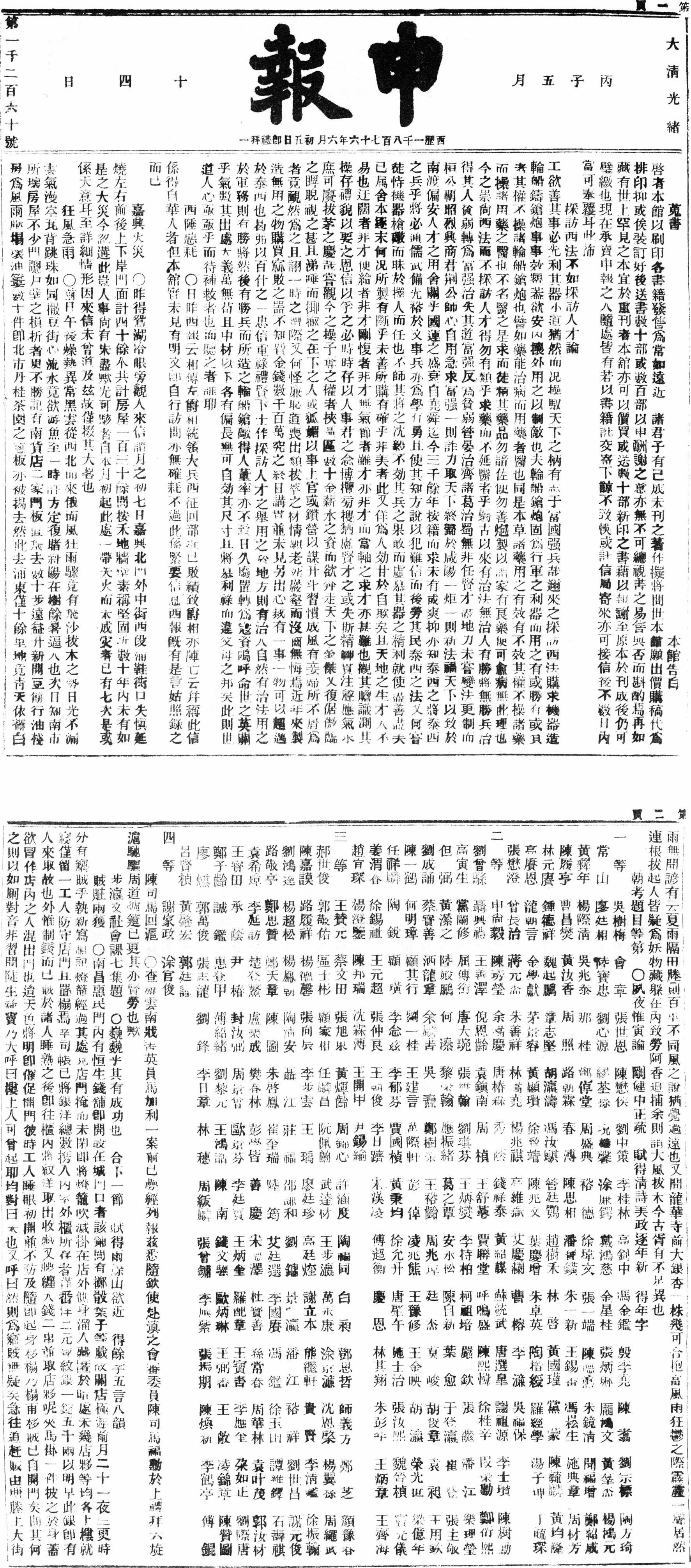 中文（中国大陆）: 《申報》1876年6月5日